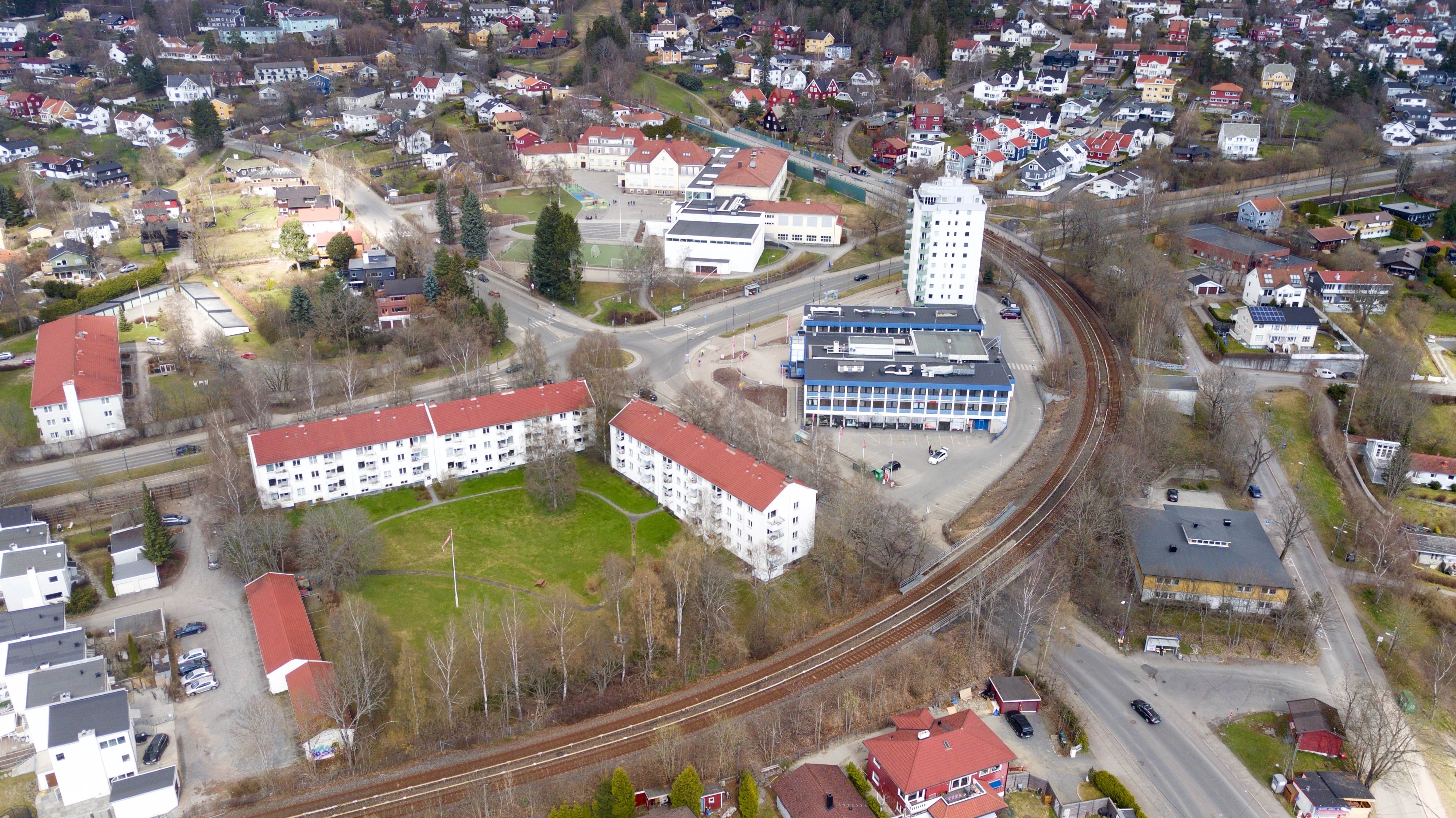 Tåsen senter, Rolf Wickstrøms vei, Nordbergveien i Oslo.